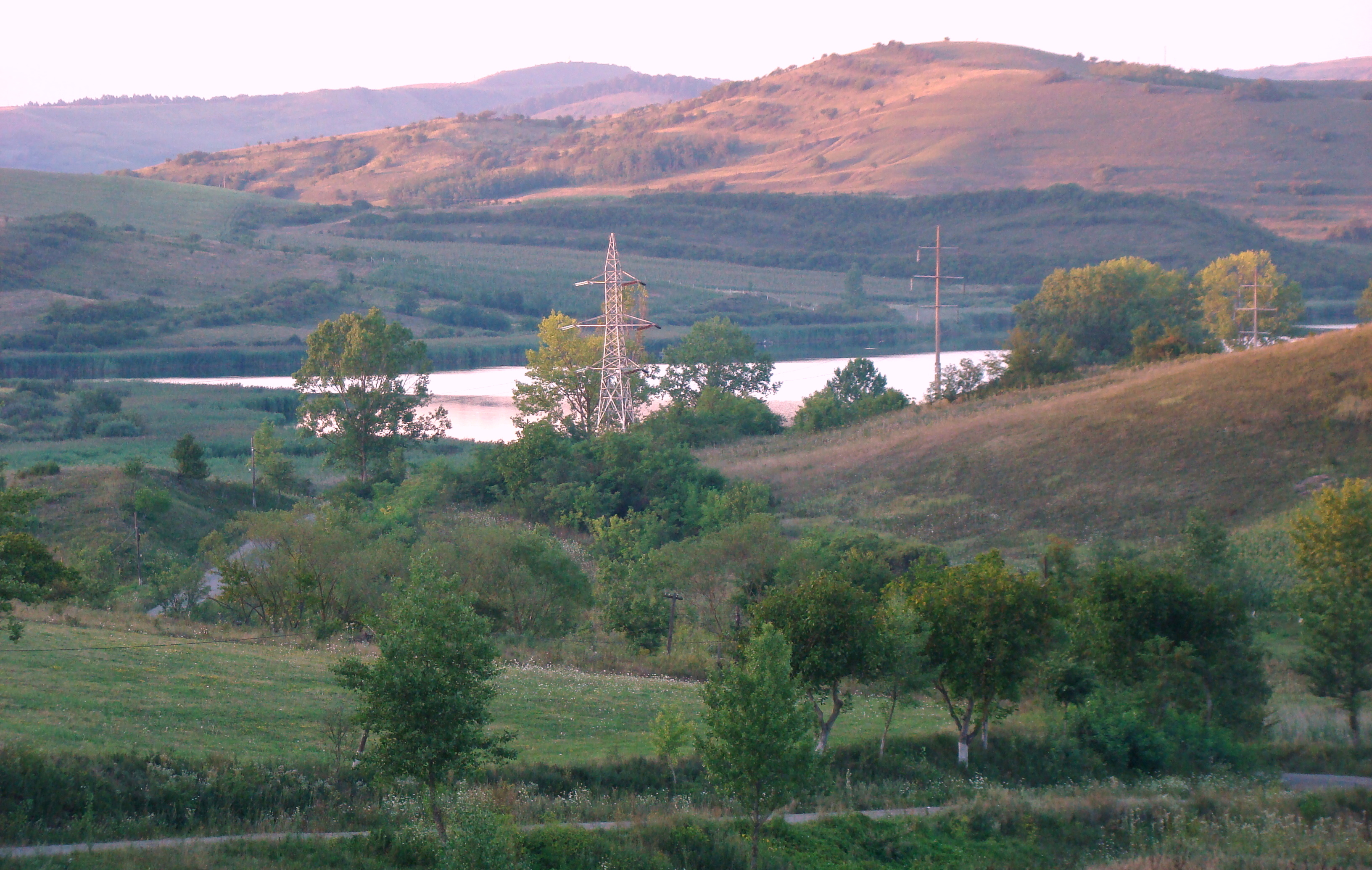 Lacul Știucilor, județul Cluj, arie protejată de interes național